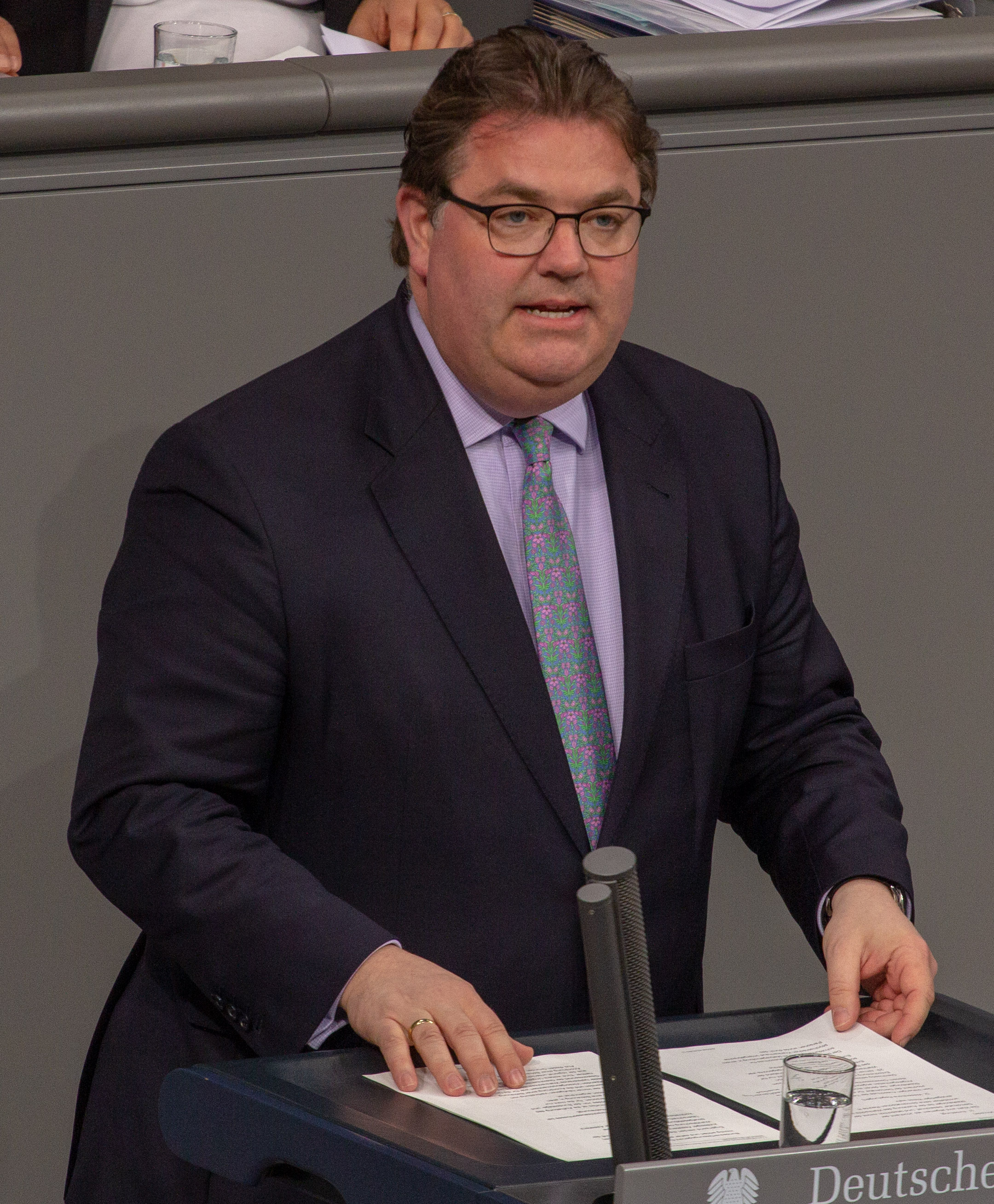 Ansgar Heveling, Mitglied des Deutschen Bundestages, während einer Plenarsitzung am 11. April 2019 in Berlin.